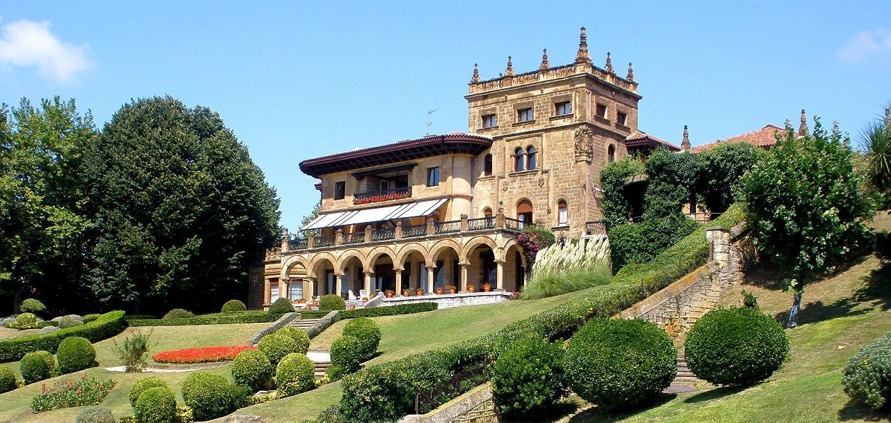 Getxoko (Bizkaia) Neguri auzoko Lezama Legizamon jauregia